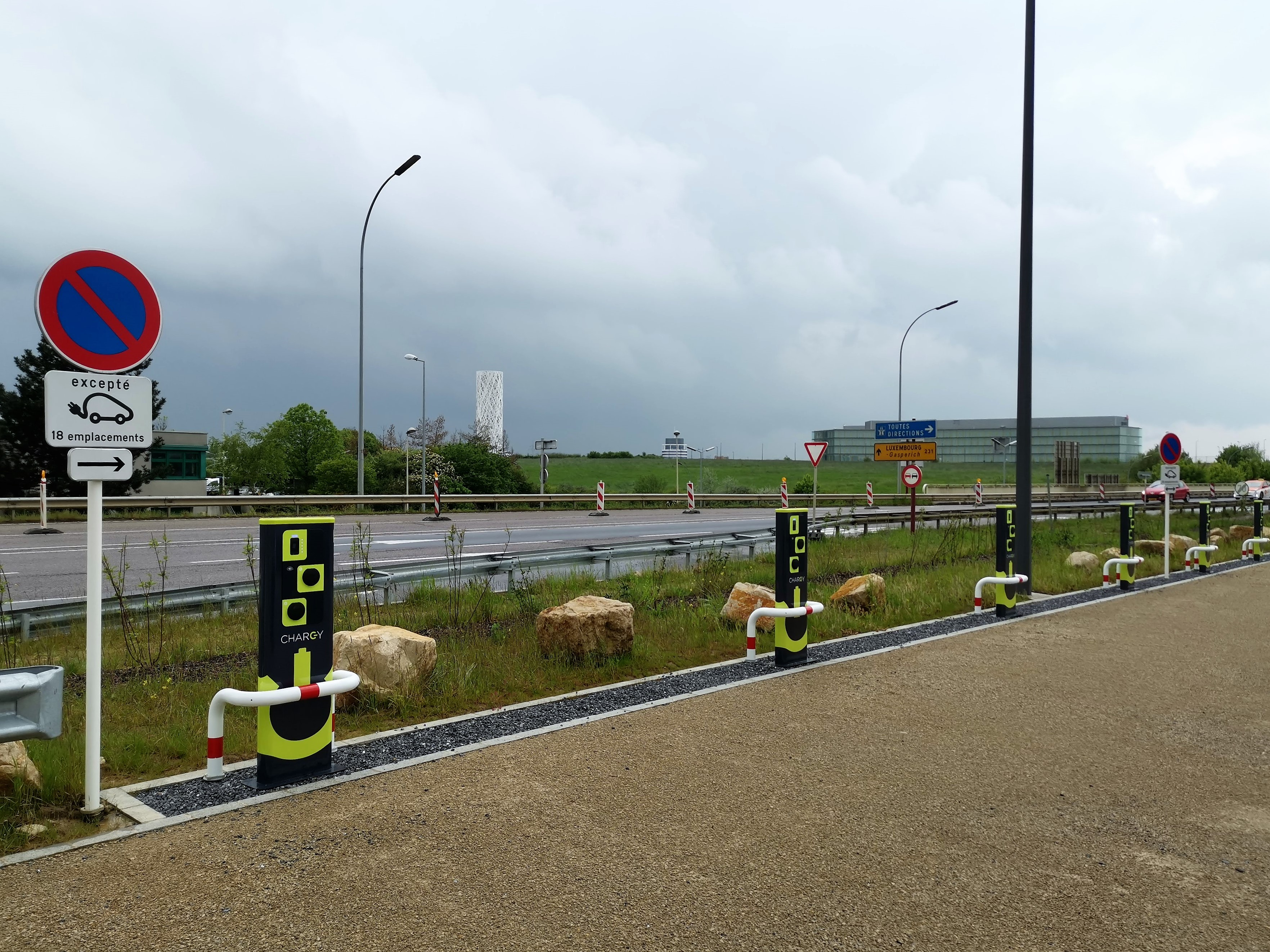 Hesperange-Howald, places de stationnement réservées aux véhicules automoteurs électriques et électriques hybrides, raccordés au point de recharge.